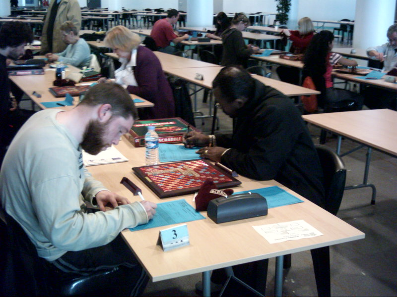 Prise par moi, a Cannes